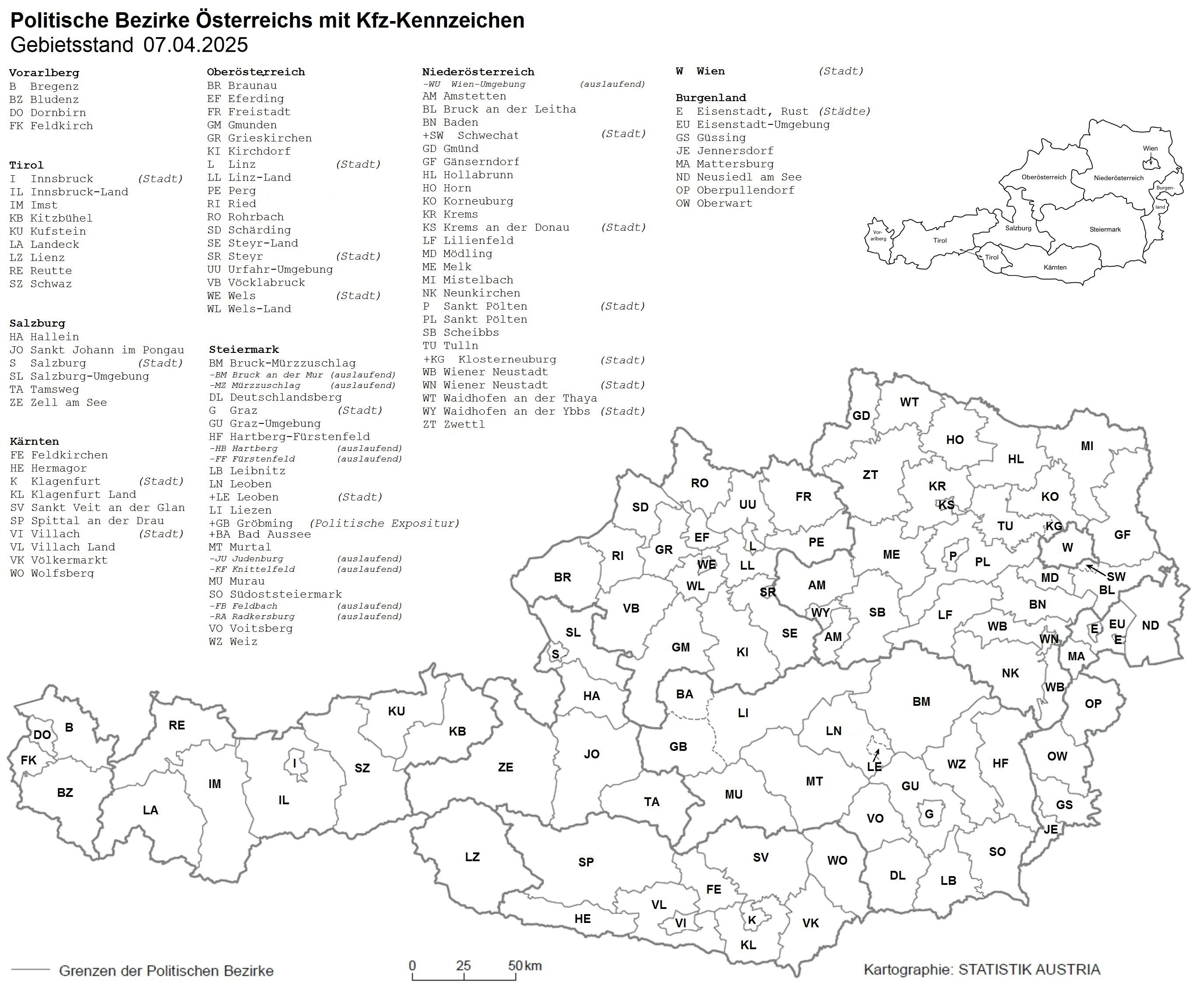 Die österreichischen Bezirke mit Kfz-Kennzeichen (Legende nach Bundesländern getrennt), Stand 2017